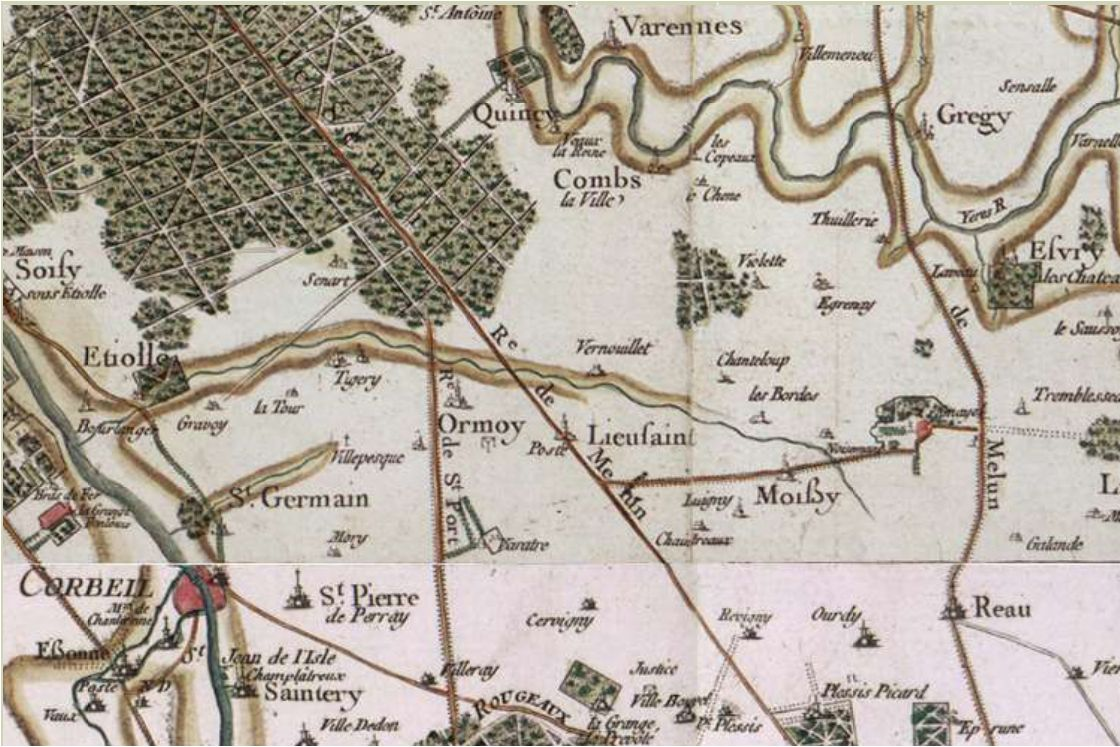 Carte de la région de Lieusaint (Seine-et-Marne) au XVIIe siècle par Cassini